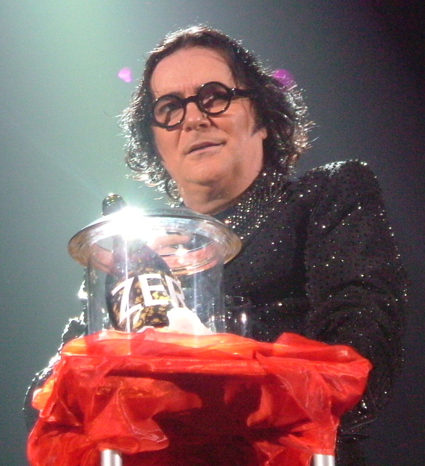 Renato Zero nel brano "Amico" durante il concerto "Zeromovimento". PalaLottomatica, Roma, 3 marzo 2006.